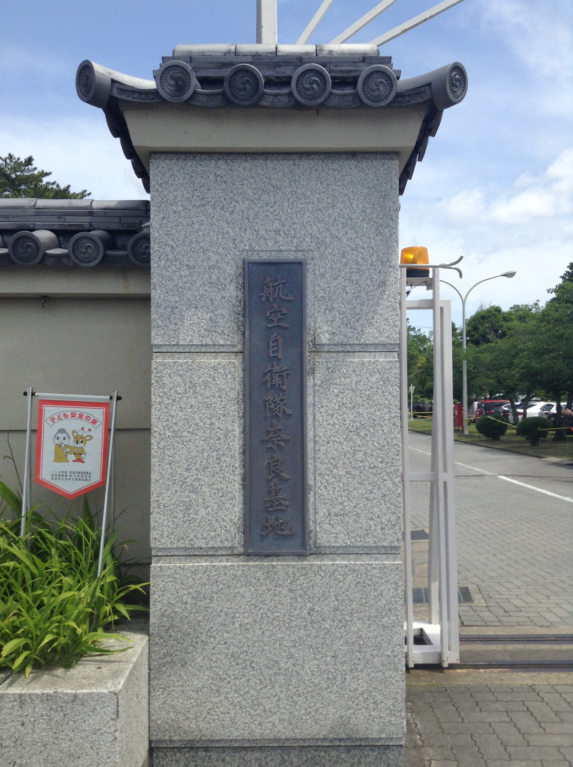 航空自衛隊 奈良基地の看板